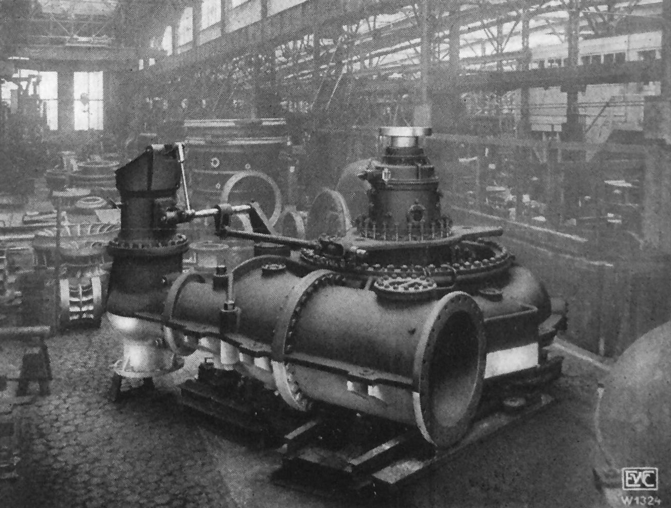 Francis-Turbine für die Zentrale Siebnen und Rempen des Wäggitalerwerkes. (8 Turbinen für 160.000 PS)